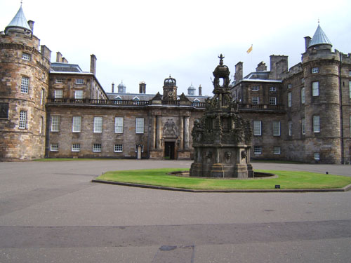 Hollyrood House, Edinburgh